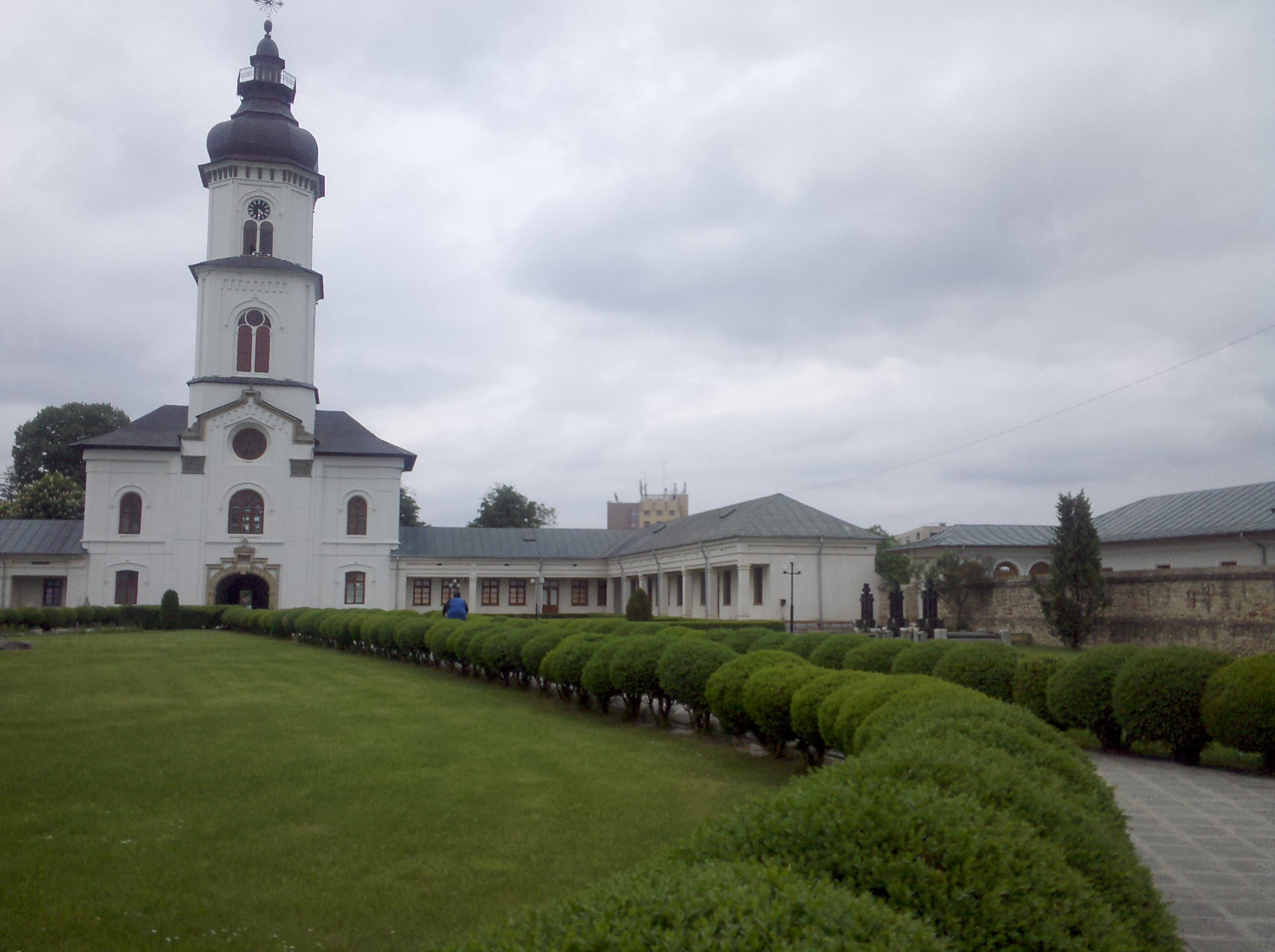 curtea şi clopotniţa arhiepiscopiei Romanului 01